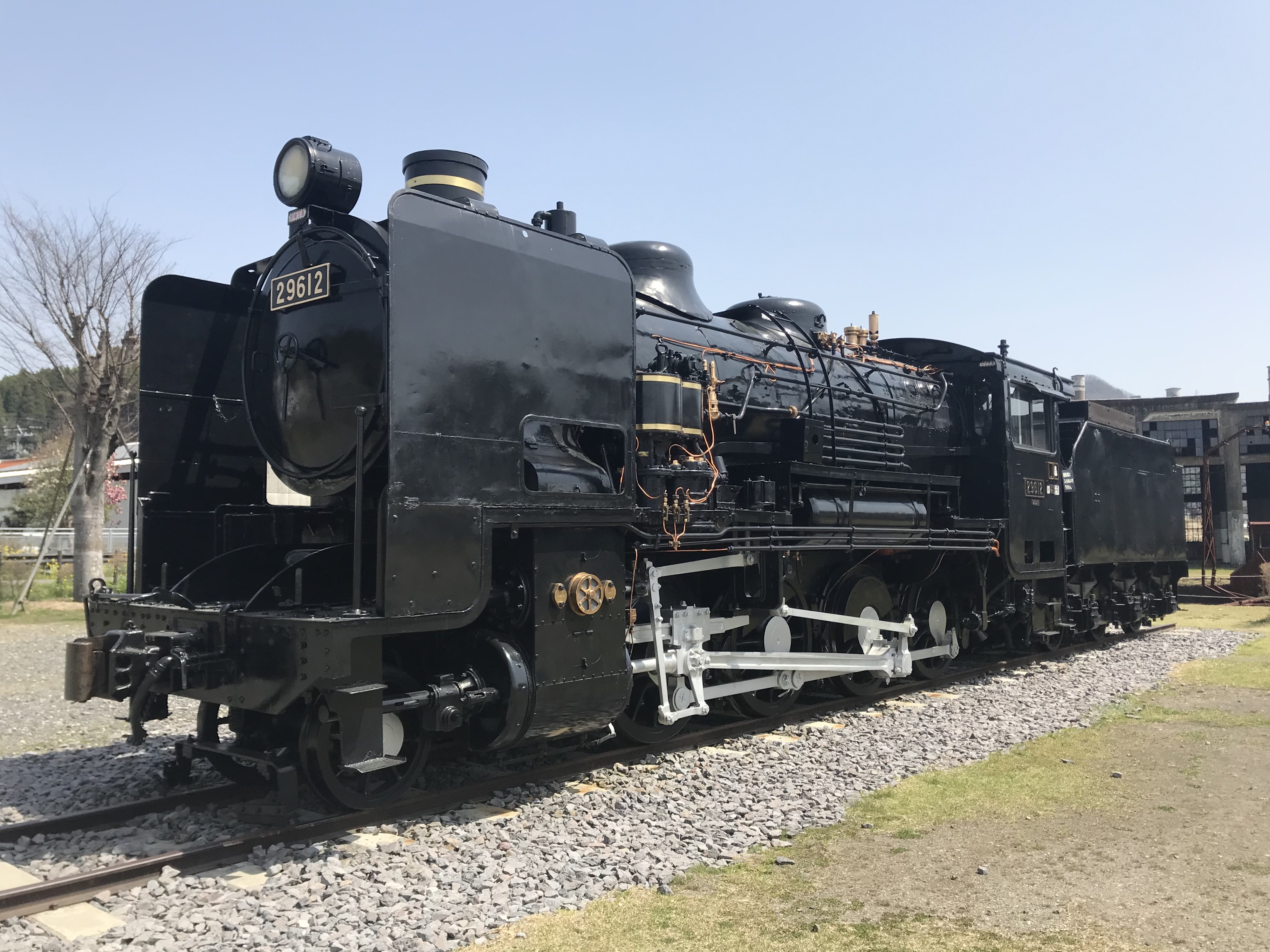 豊後森機関庫前の保存車・29612